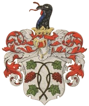 Hoveni suguvõsa aadlivapp